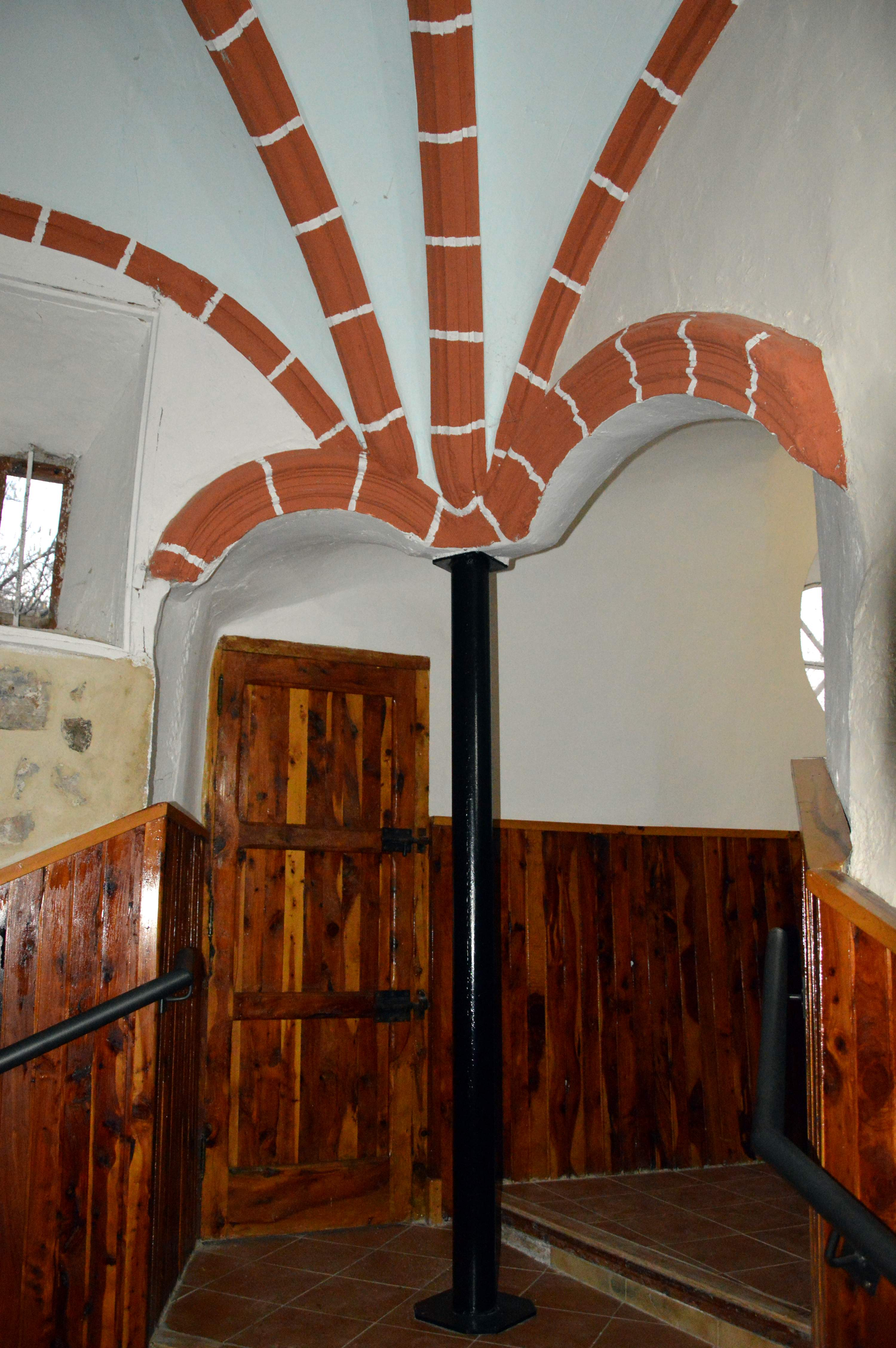 Arquería gótica en el Santuario de la Fuensanta en Villel (Teruel), 2019.